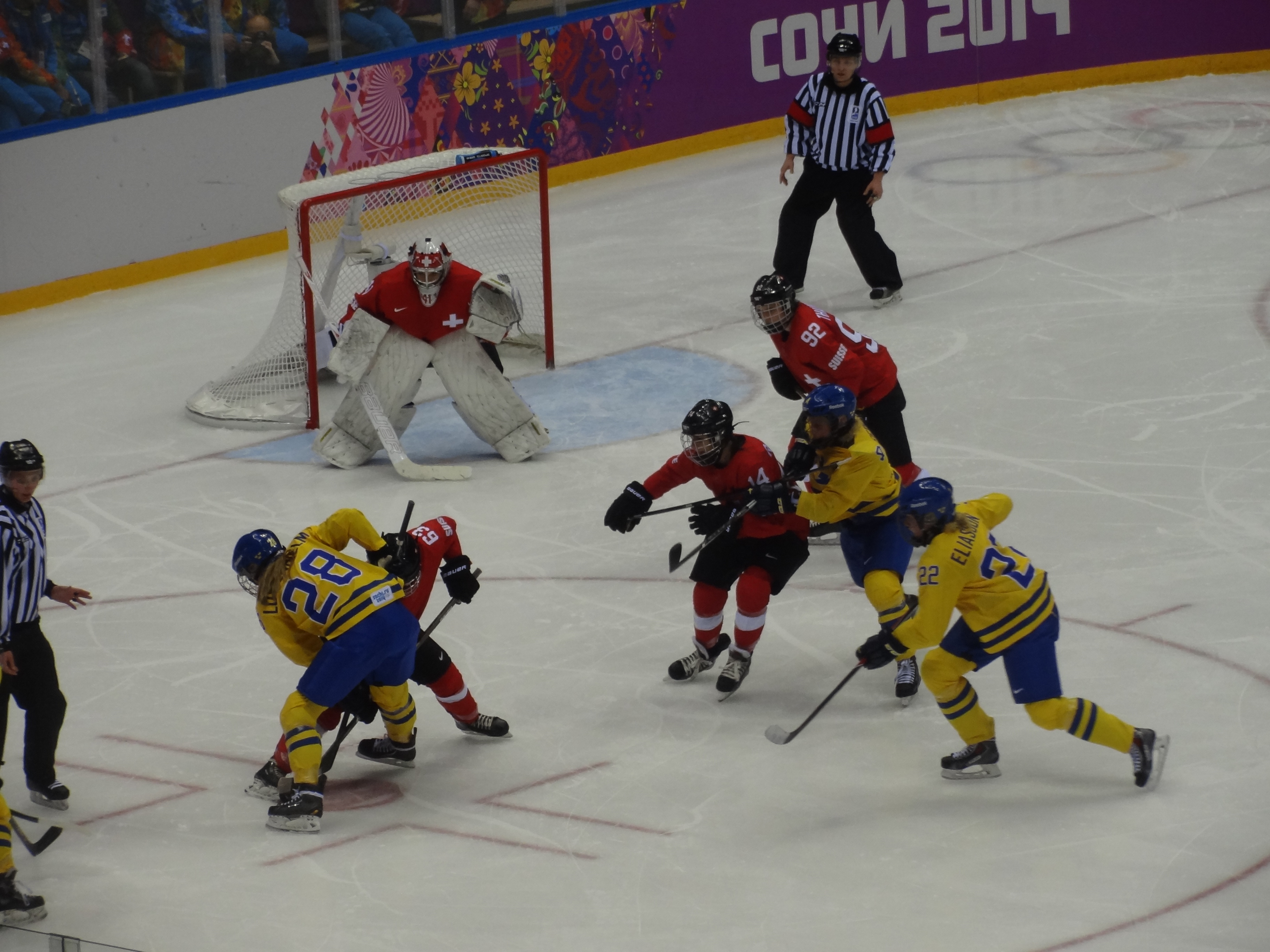 XXII Олимпийские зимние игры. Сочи, 20 февраля Хоккей. Женщины. За третье место. Швеция – Швейцария – 3:4 (1:0, 1:0, 1:4).